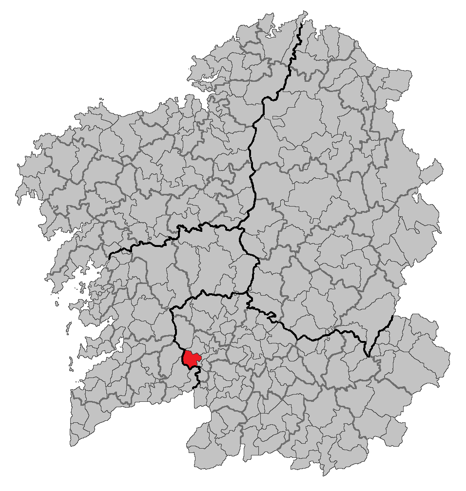 Mapa coa localización do concello de Melón.